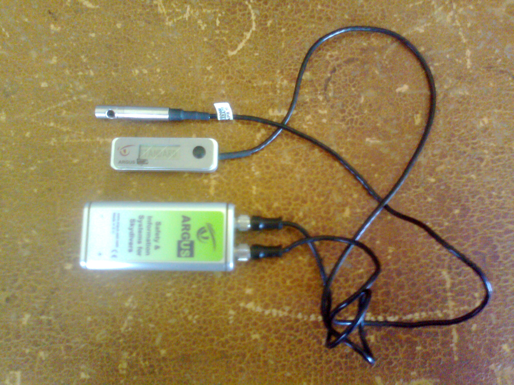 AAD - ARGUS